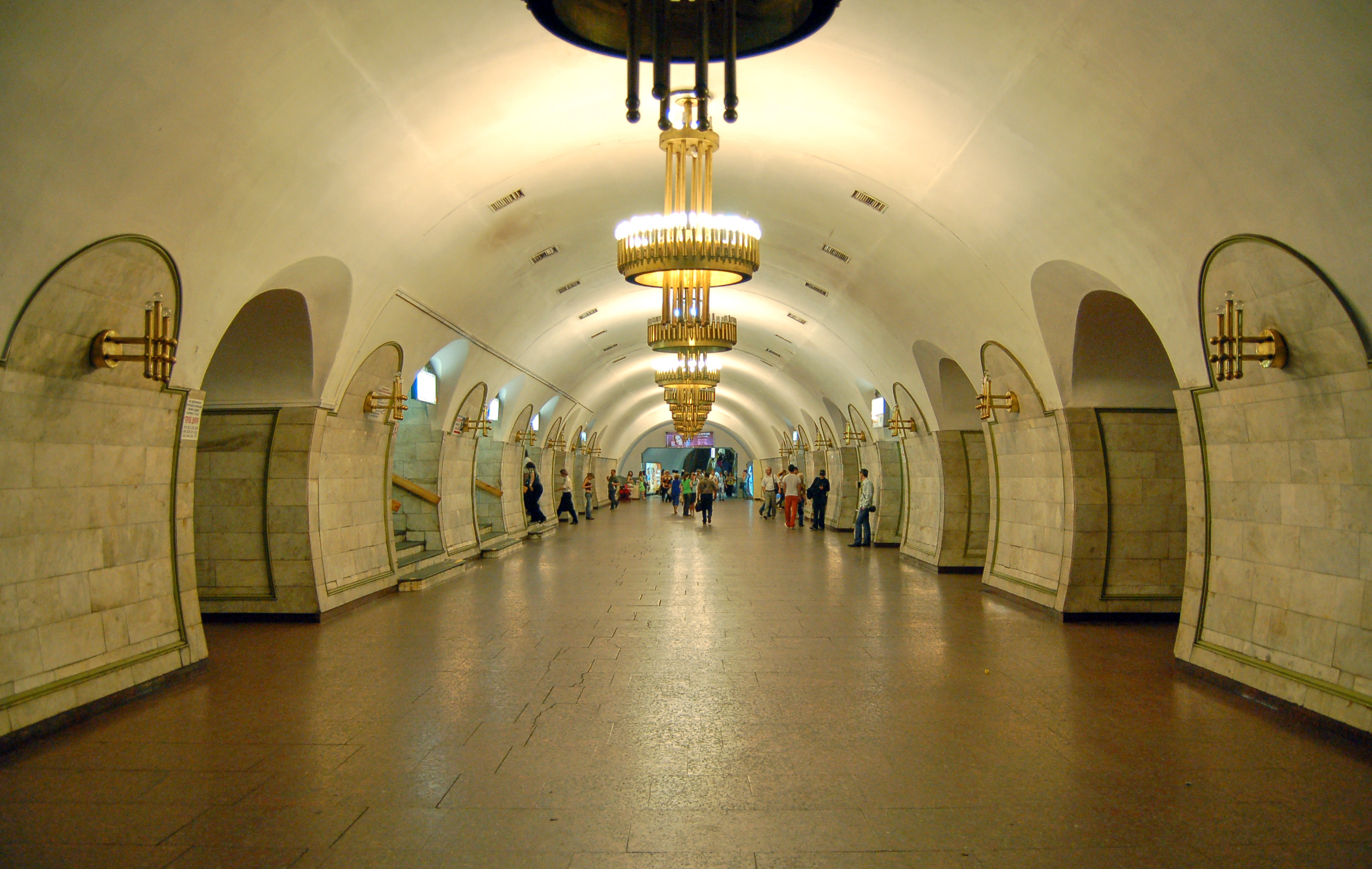 Cтанция метро «Площадь Льва Толстого», центральный зал